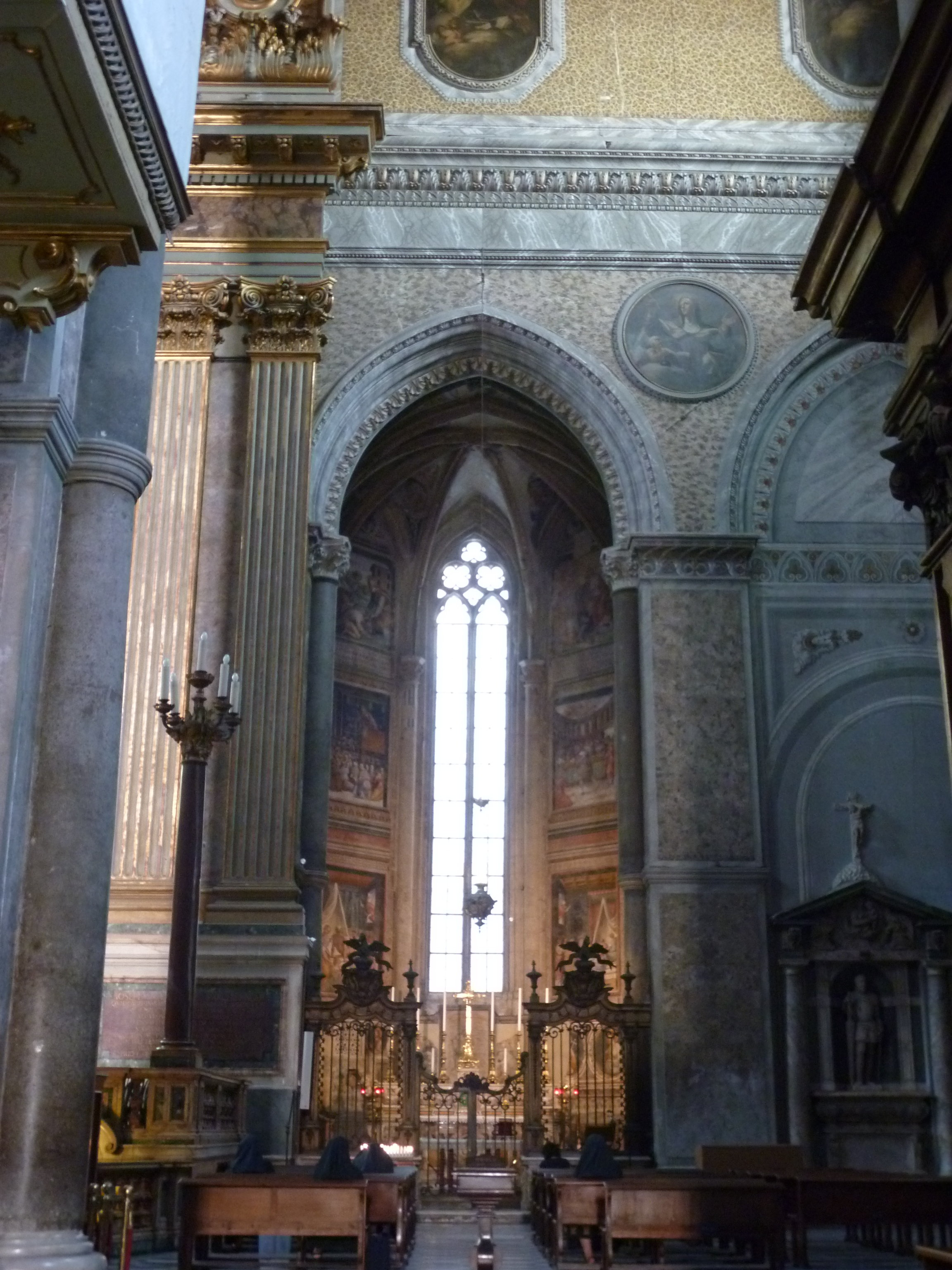 Napoli